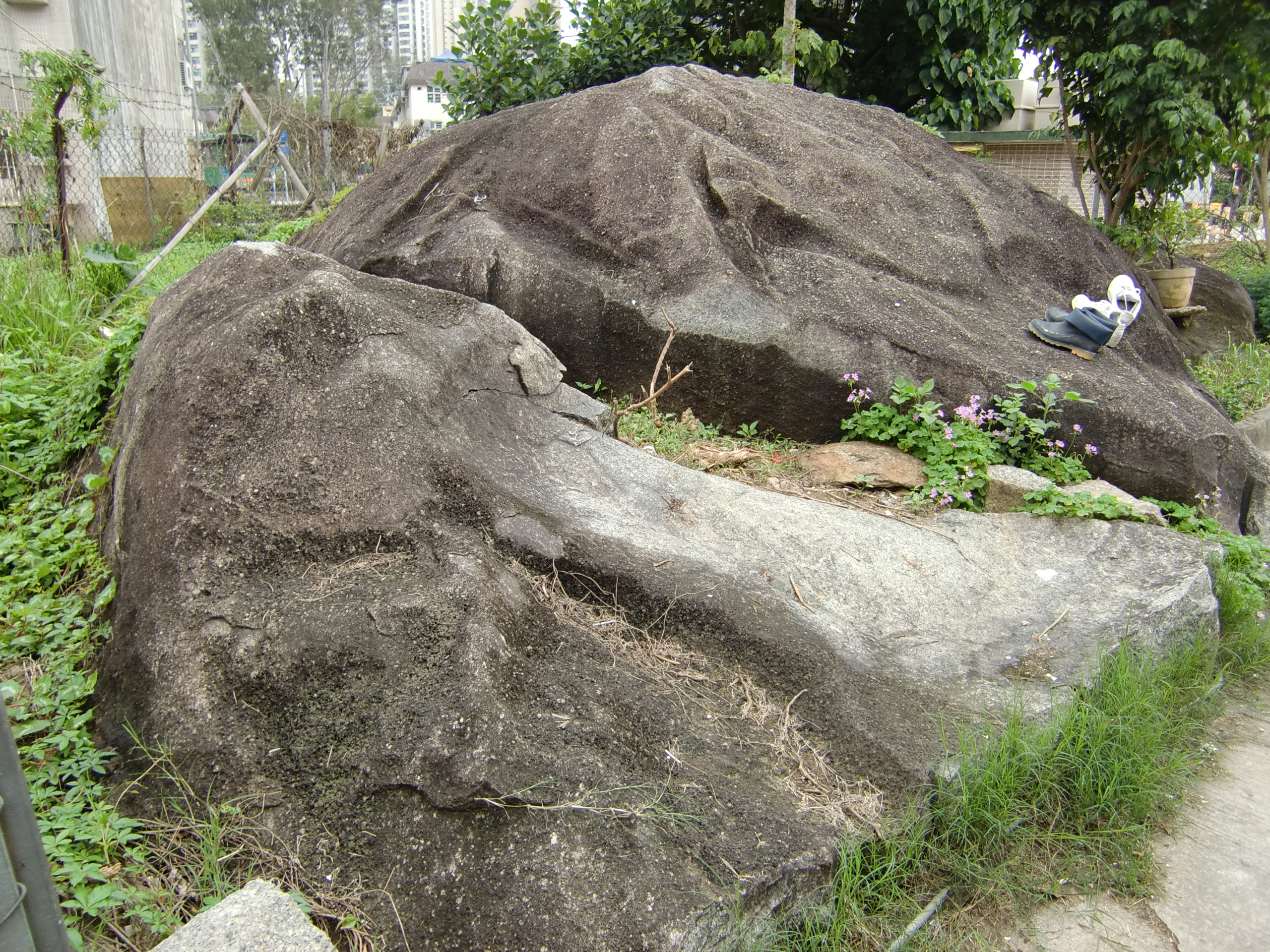 粵語: 石鼓，係大嚿嘅石。